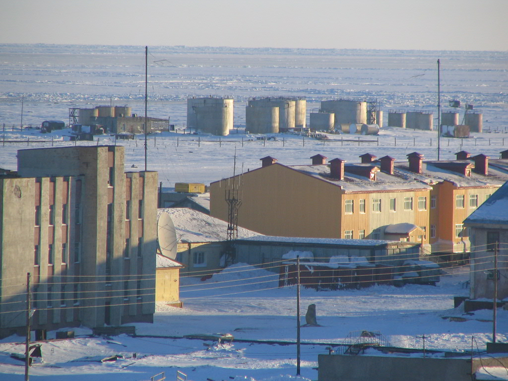 lavrentiya 02/2005